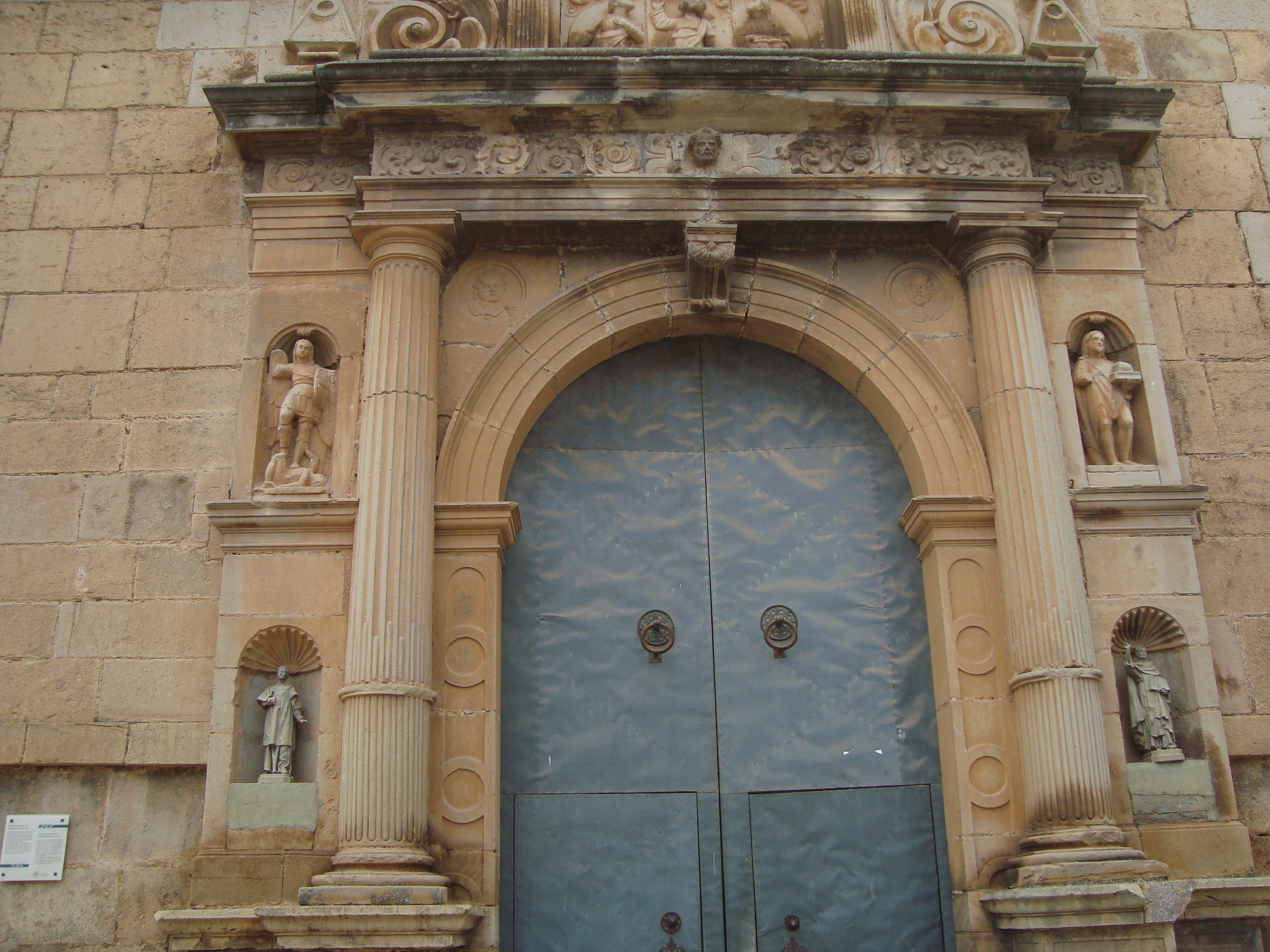 Portada de la iglesia parroquial de Les Useres/Useras